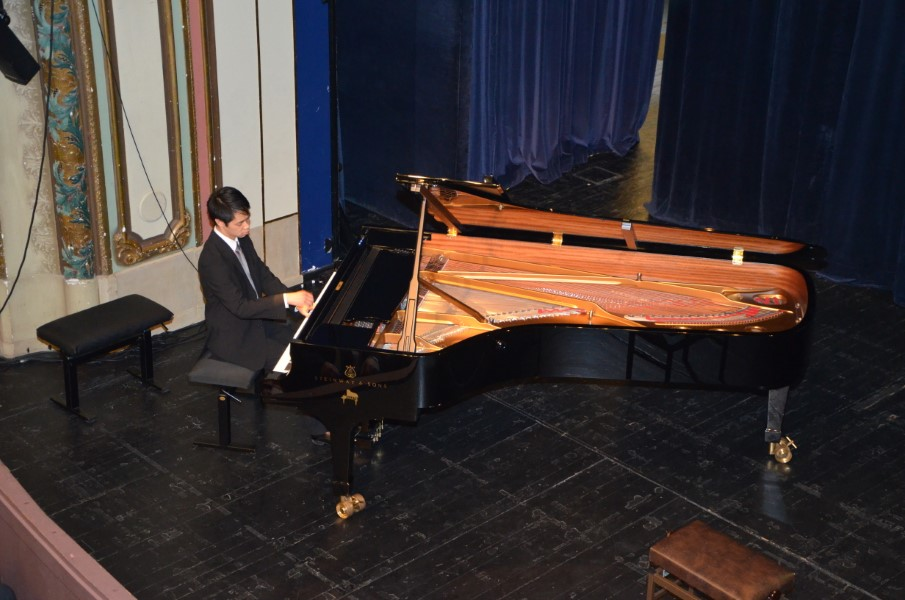 See Siang Wong during the presentation of the 'Gouden Label 2013'